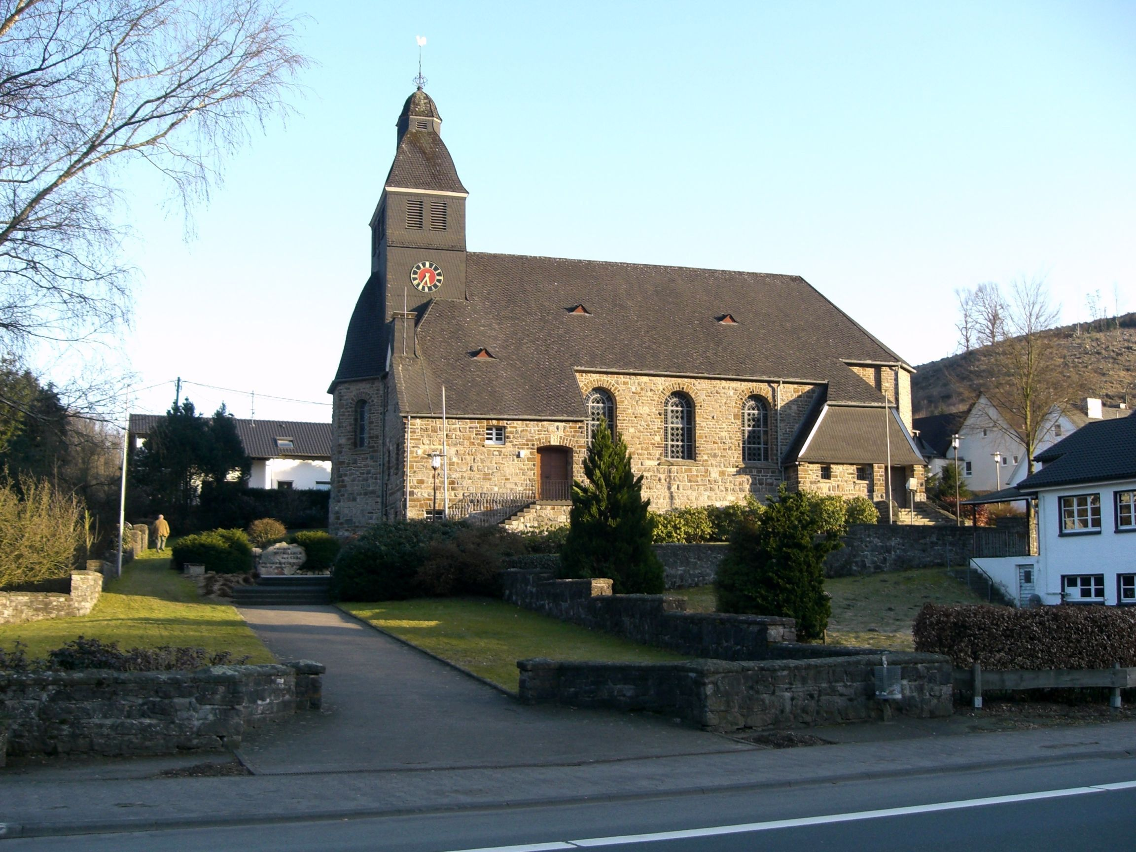 römisch-katholische Kirche St. Maria Immaculalata in Oberelspe (Lennestadt, Kreis Olpe, Nordrhein-Westfalen), erbaut 1920-1922